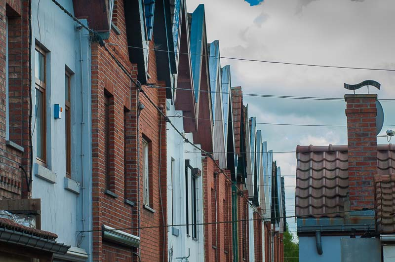 Coron d'Appaumée : Maisons ouvrières bâties près du charbonnage d'Appaumée.